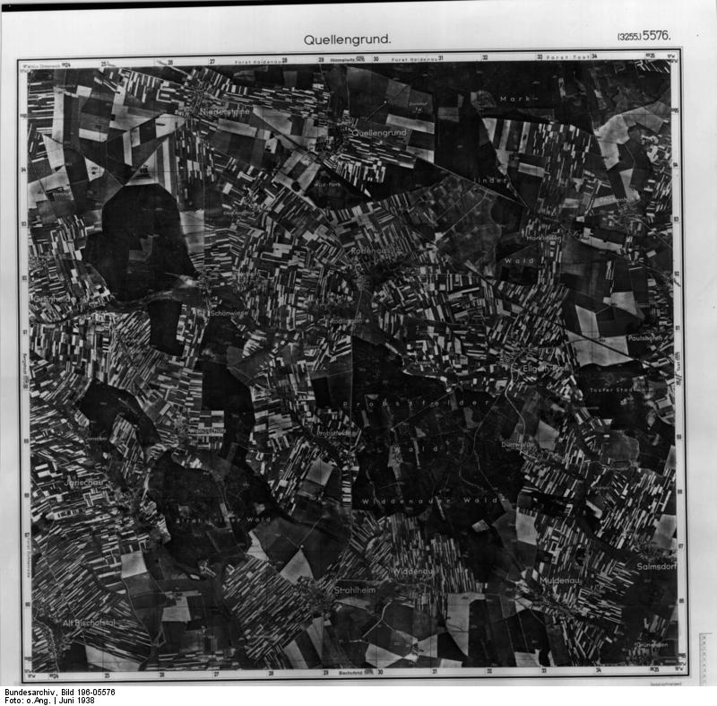 Quellengrund